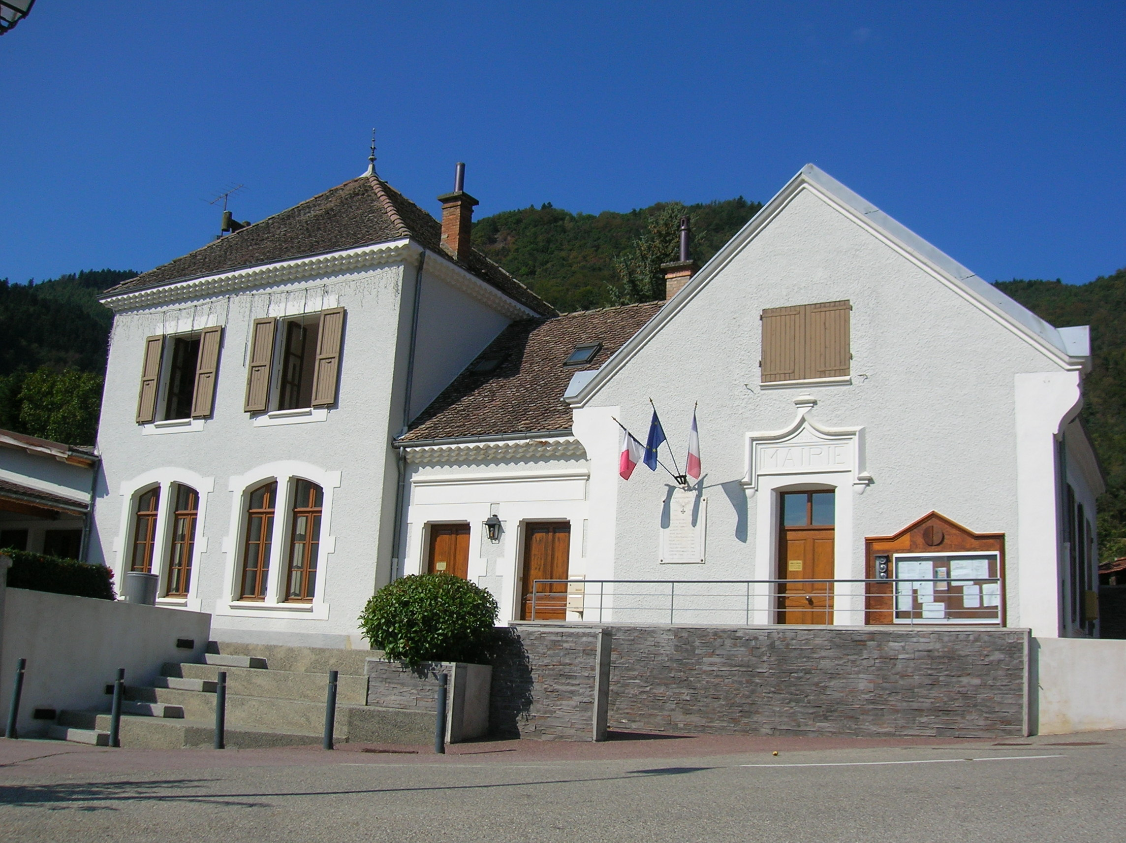 Treffort, Isère, AuRA, France.